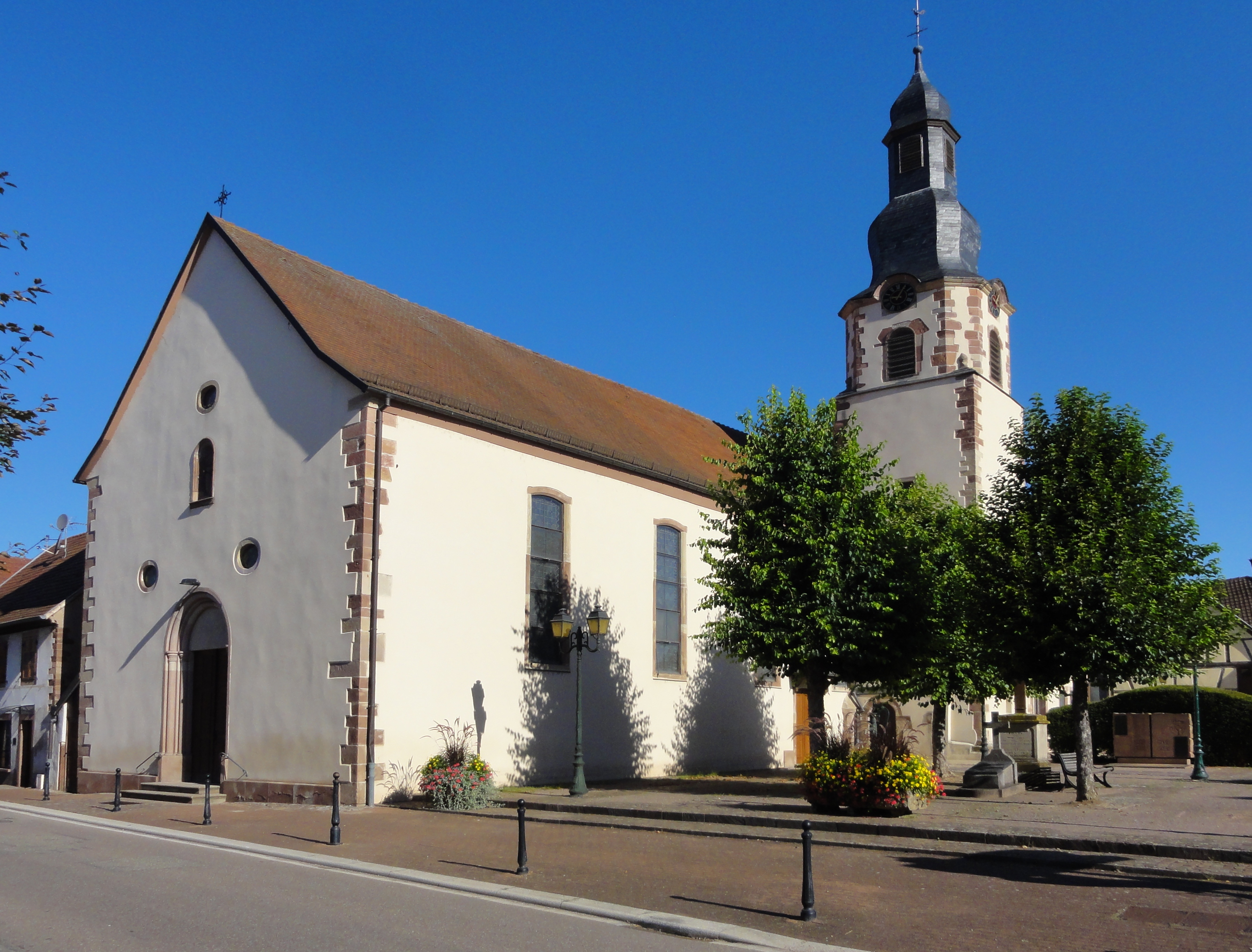 Alsace, Bas-Rhin, Église Saint-Nicolas d'Ergersheim (IA67011803).